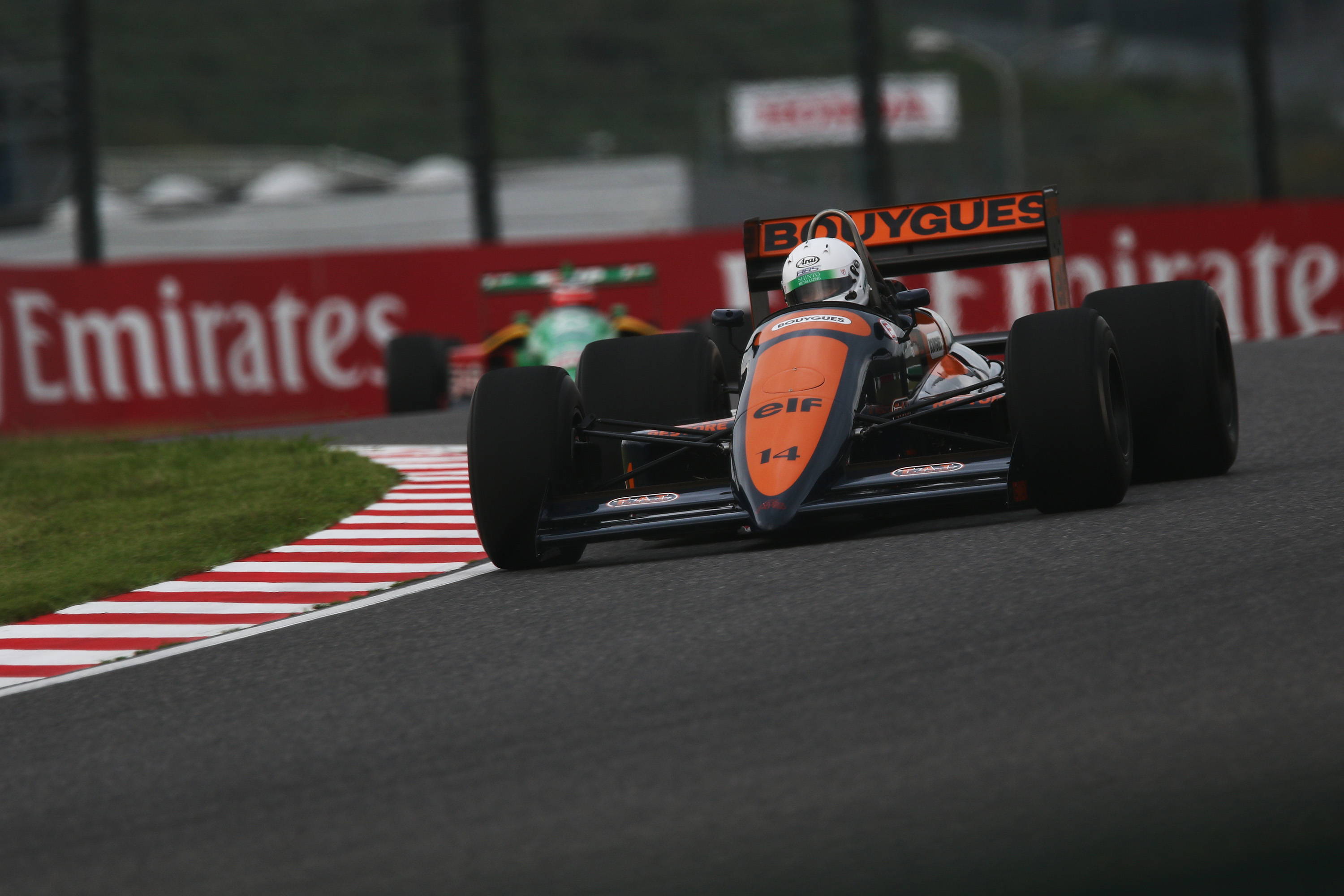 Philippe Streiff AGS JH23 2018 Japanese Grand Prix.